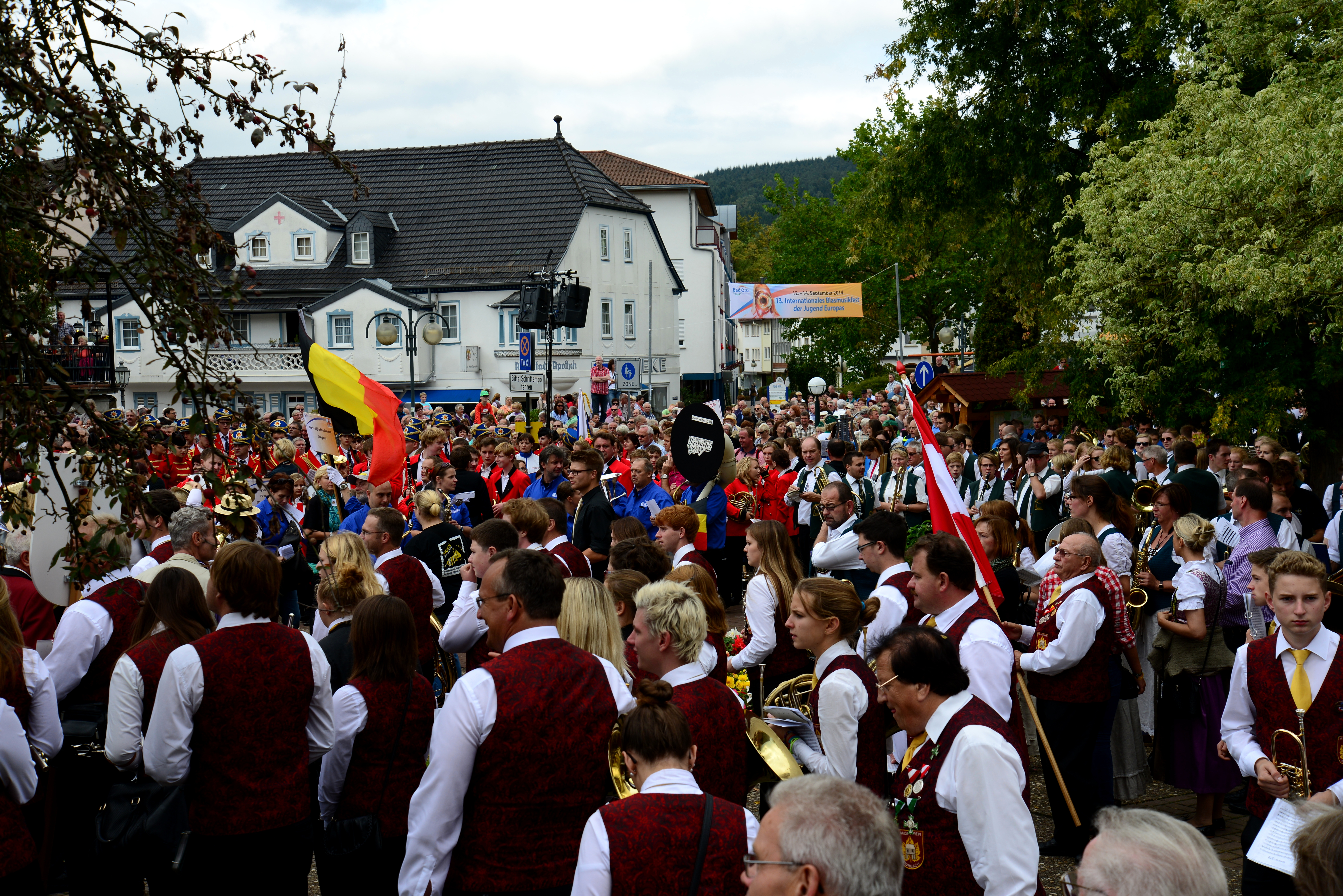 Das Großkonzert am Sonntag mit allen Orchestern.